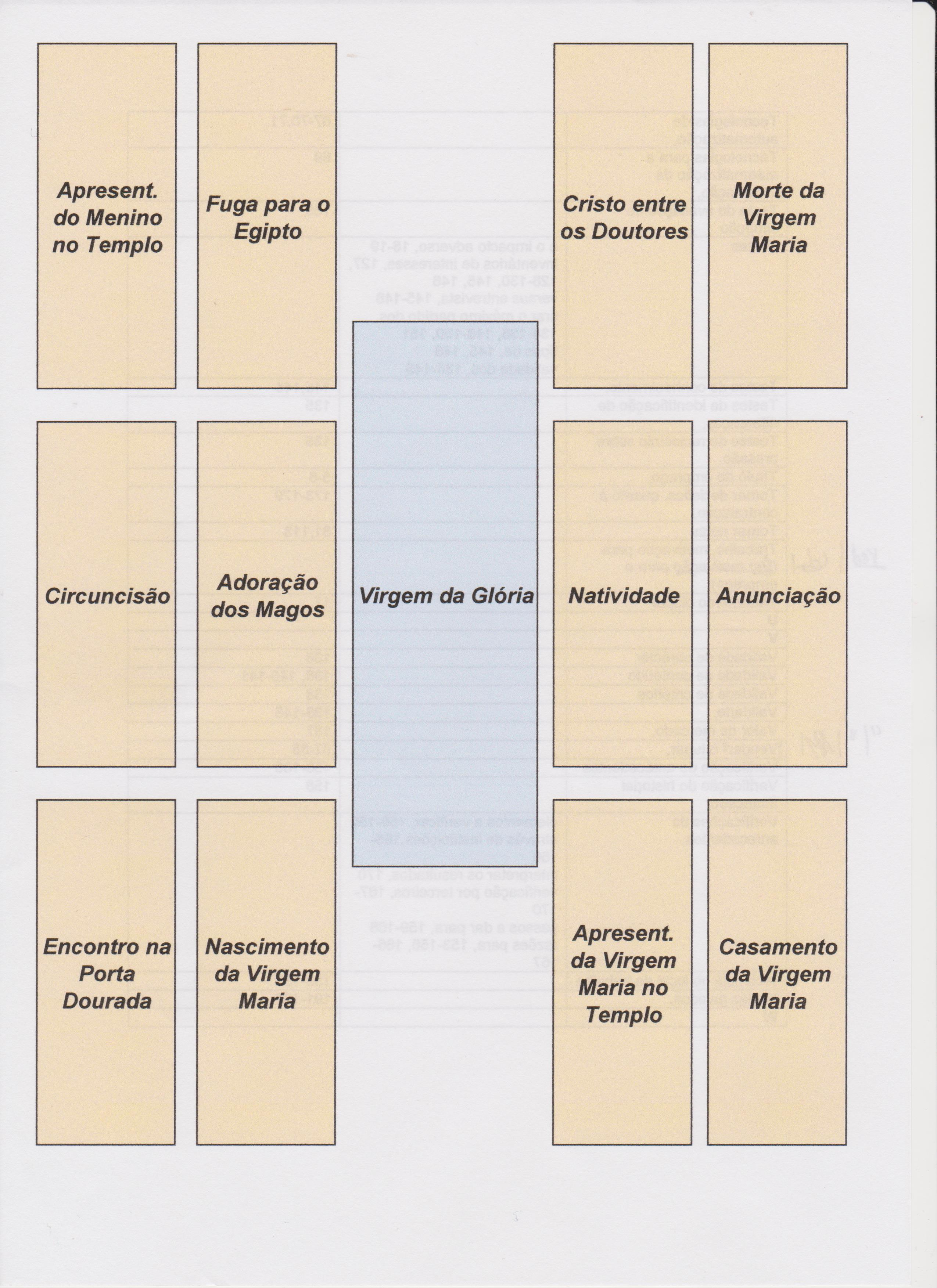 Reconstituição pelo Museu de Évora do Político quinhentista da Sé de Évora sobre a Vida da Virgem